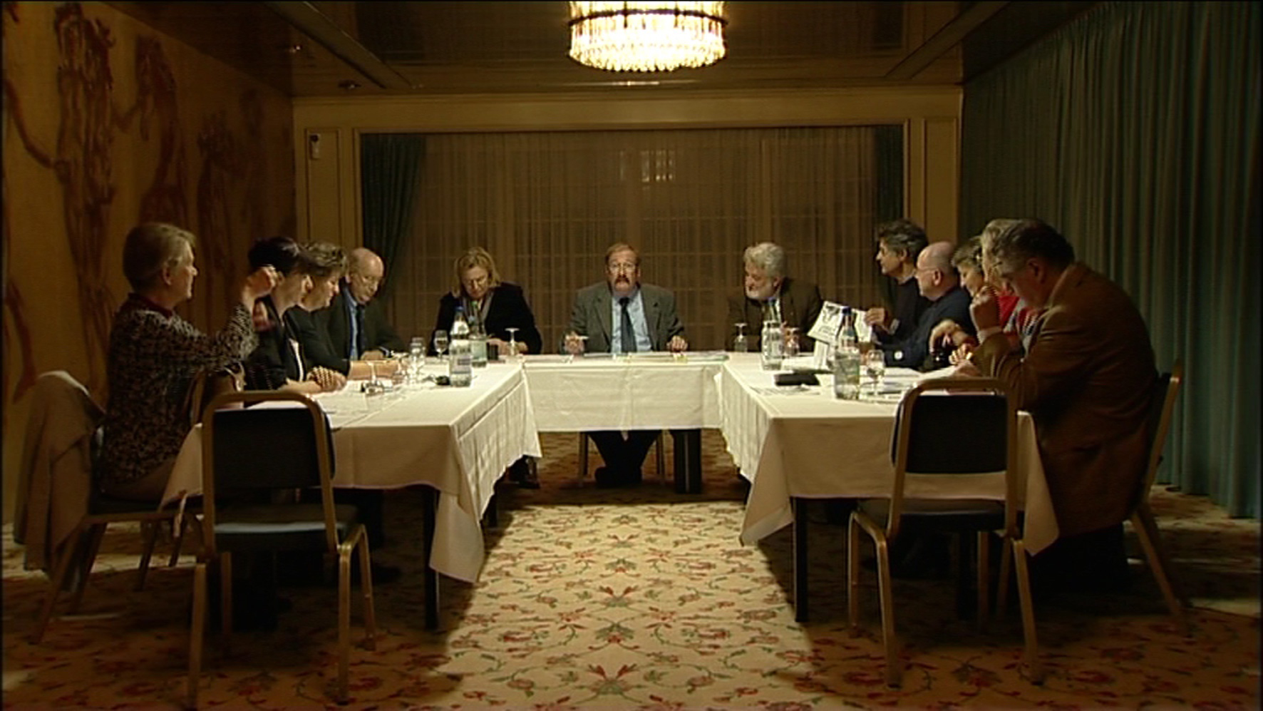 Réunion des accompagnateurs d’Exit. Image tirée du film « EXIT, le droit de mourir » de Fernand Melgar.